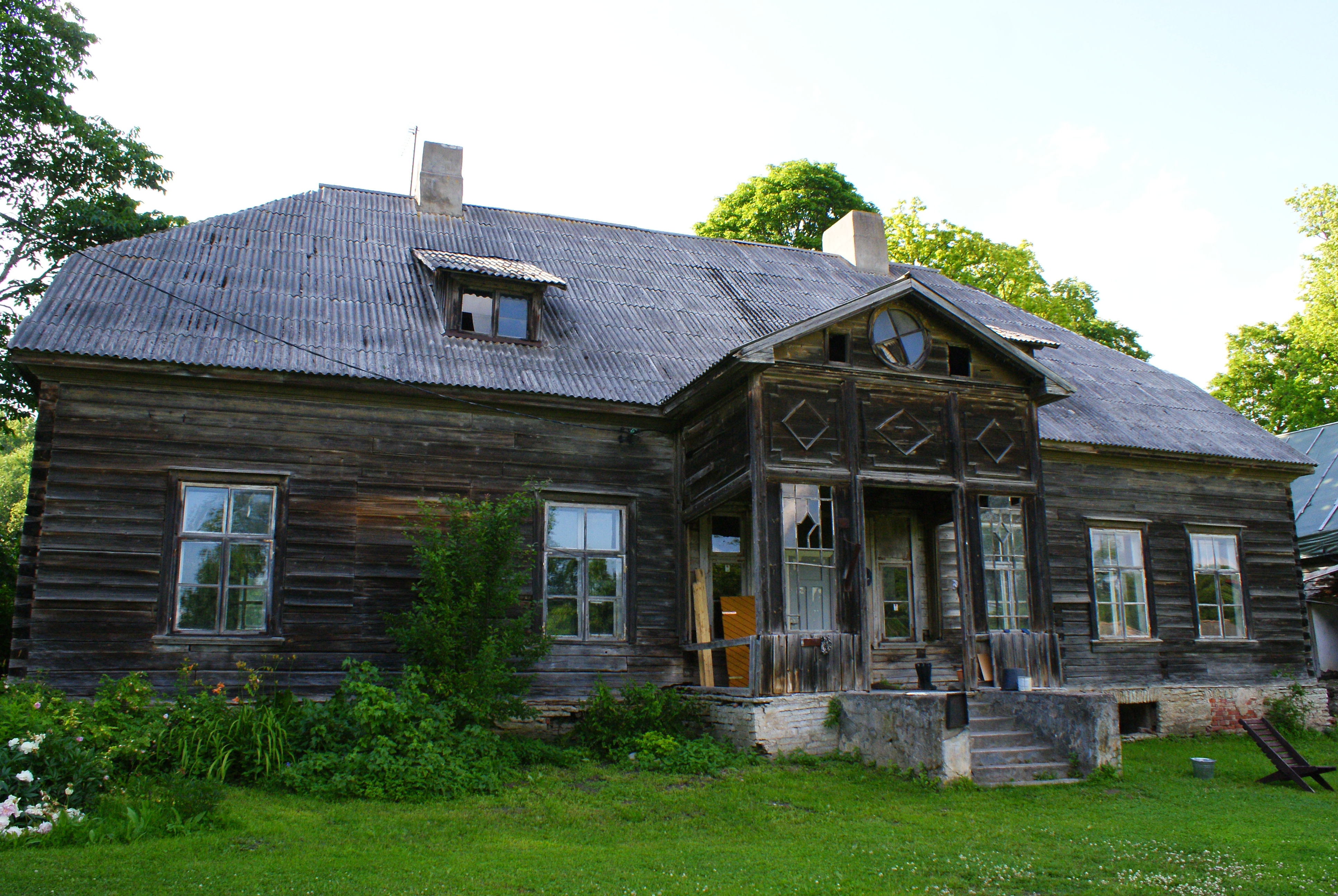 Arbavere mõisa peahoone